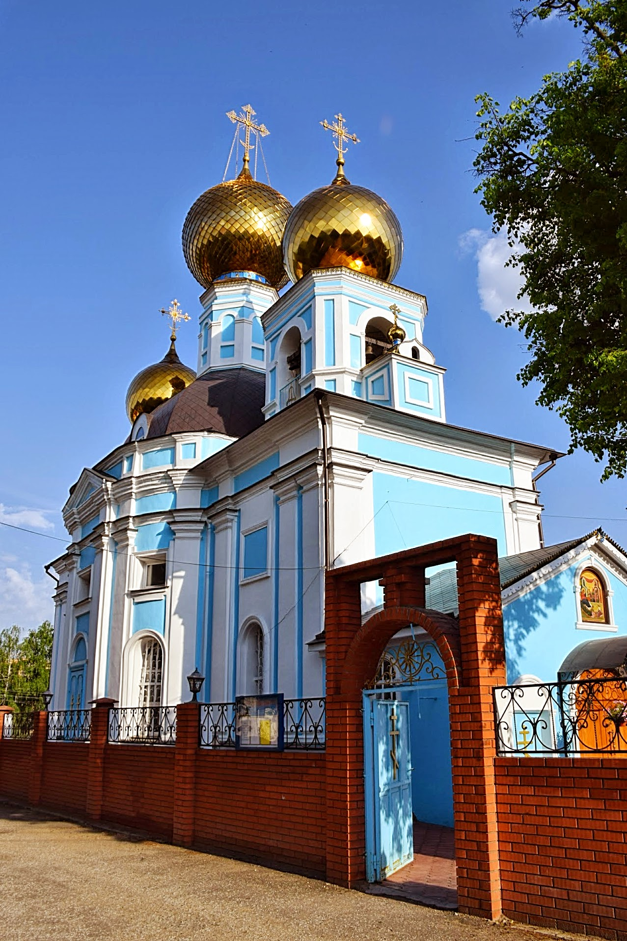 Церковь Рождества Пресвятой Богородицы: Тарычево, Ленинский район, Московская область